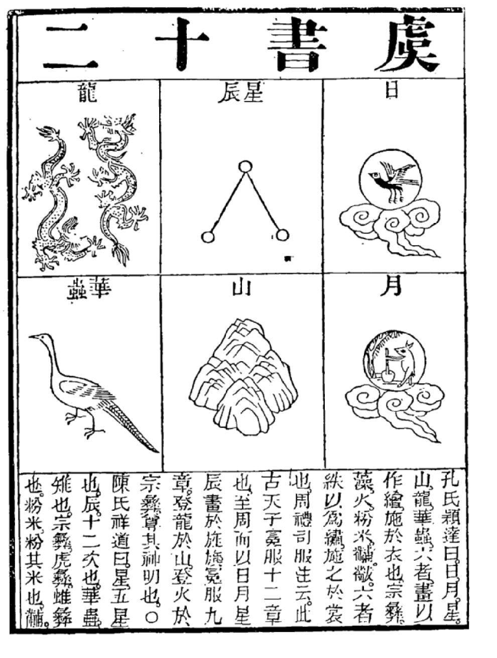 Douze emblemes des rites, seconde planche, page 205 du volume 3 des Memoires historiques de Sima Qian, traduction Edouard Chavannes